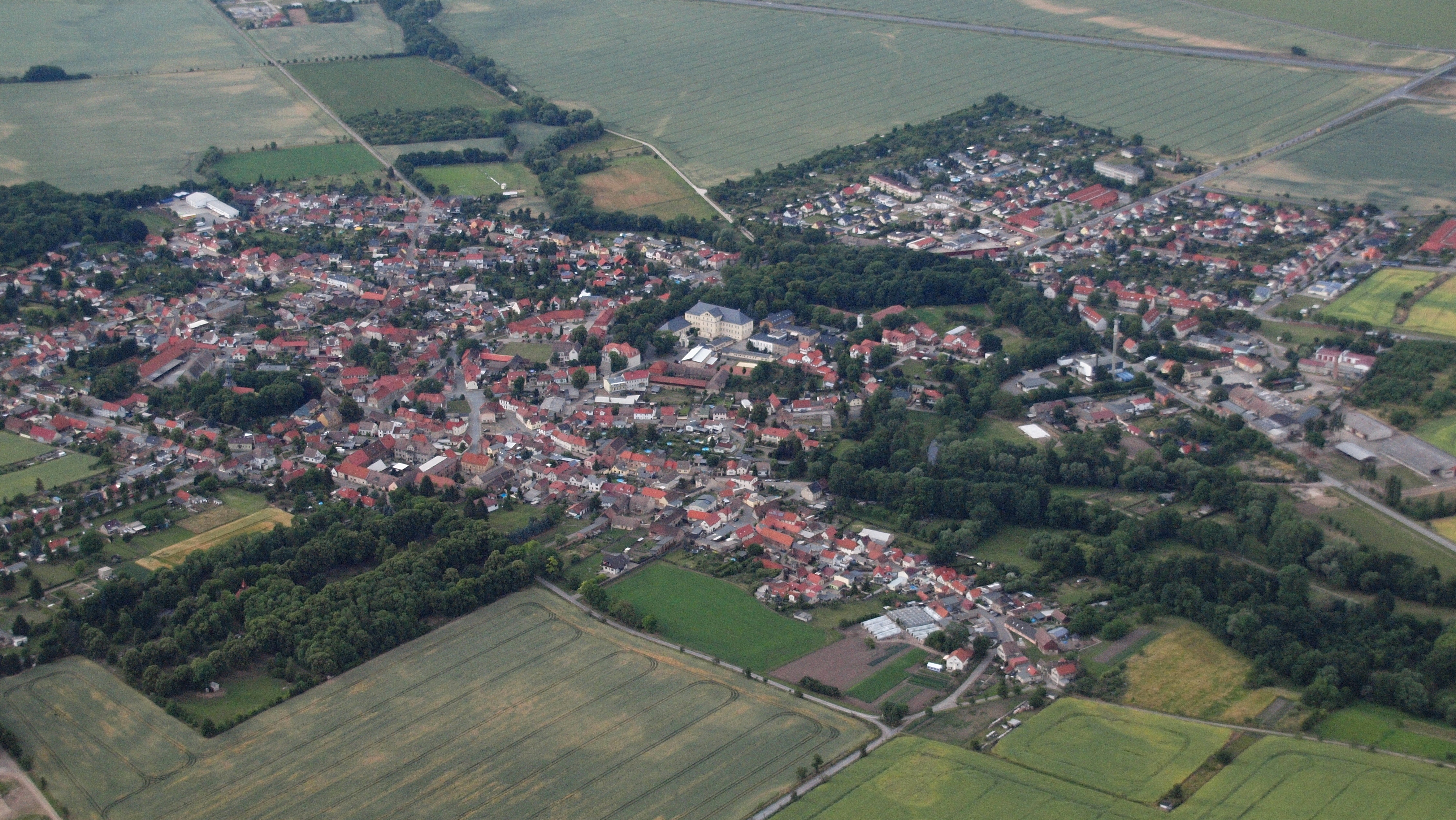 Hoym, Luftaufnahme (2015)